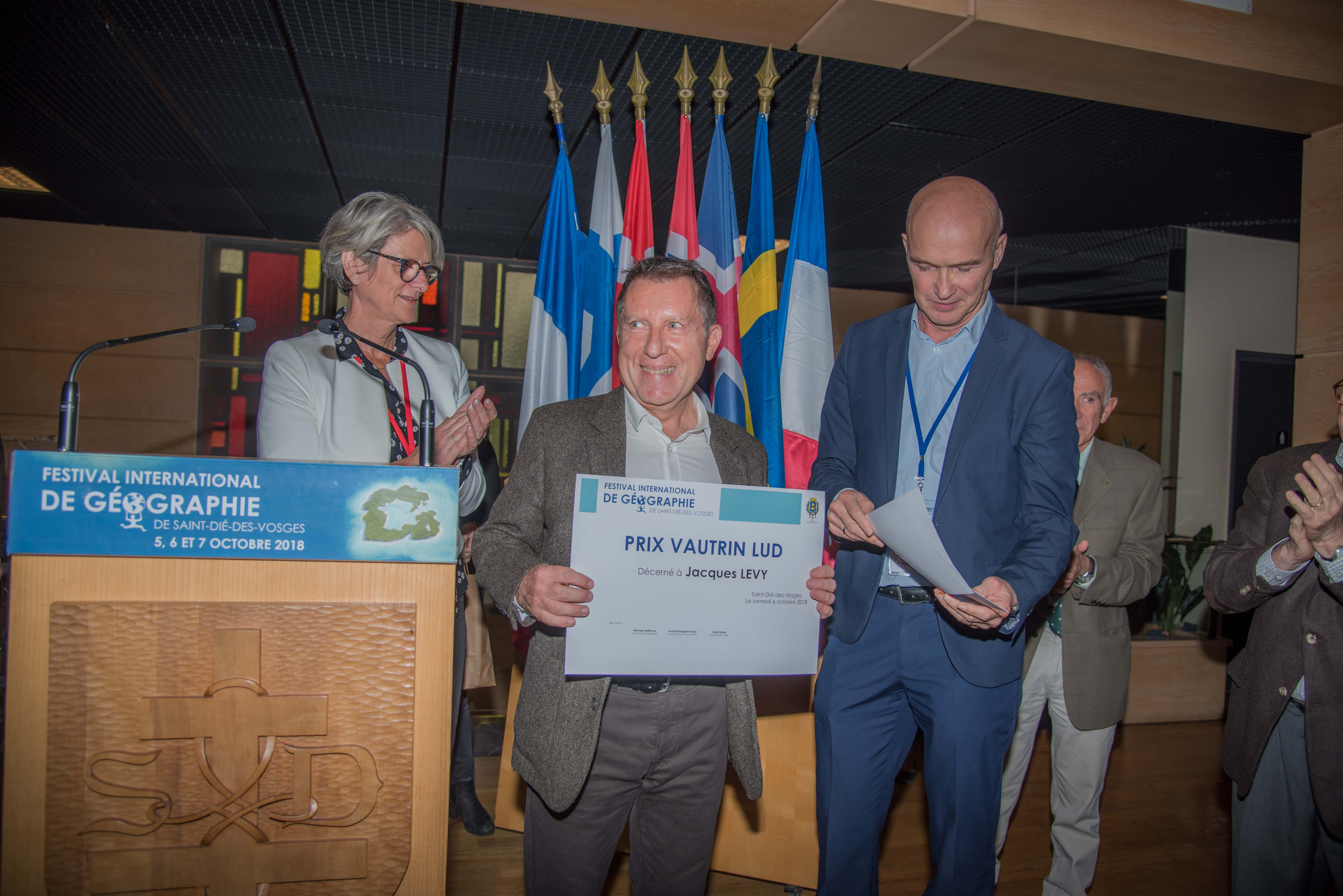 Remise du prix Vautrin-Lud à Jacques Lévy, à l'hôtel de ville de Saint-Dié-des-Vosges, lors du Festival international de géographie 2018.